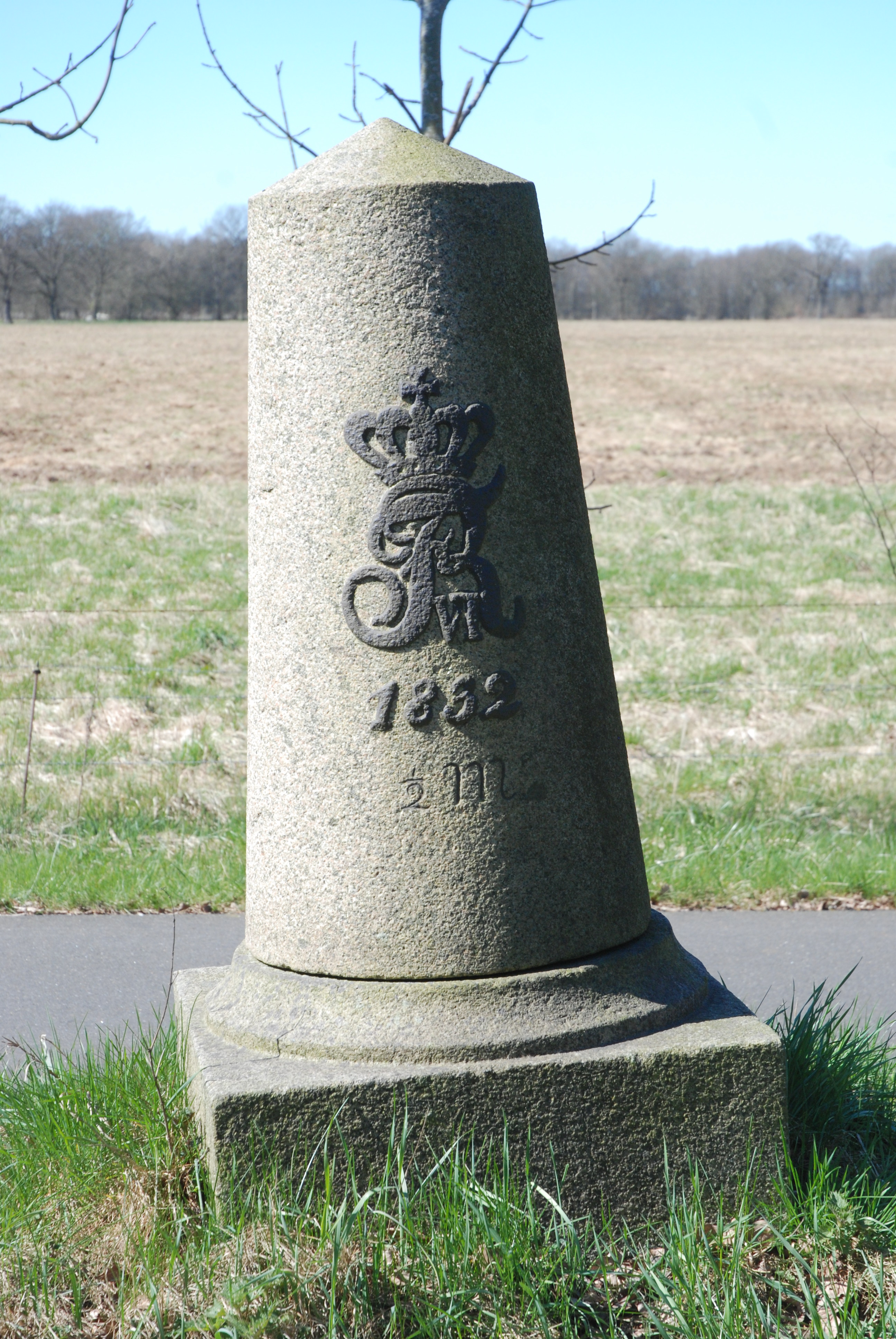 Meilenstein von 1832 an der Bundesstraße 4 bei Wittorf (Altona/Kiel)